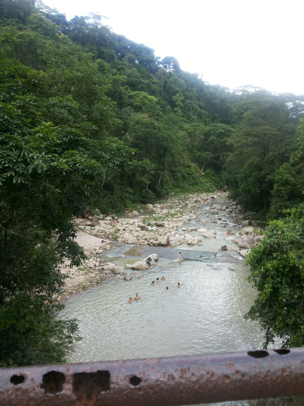 el baleneario mas popular en temporada de verano